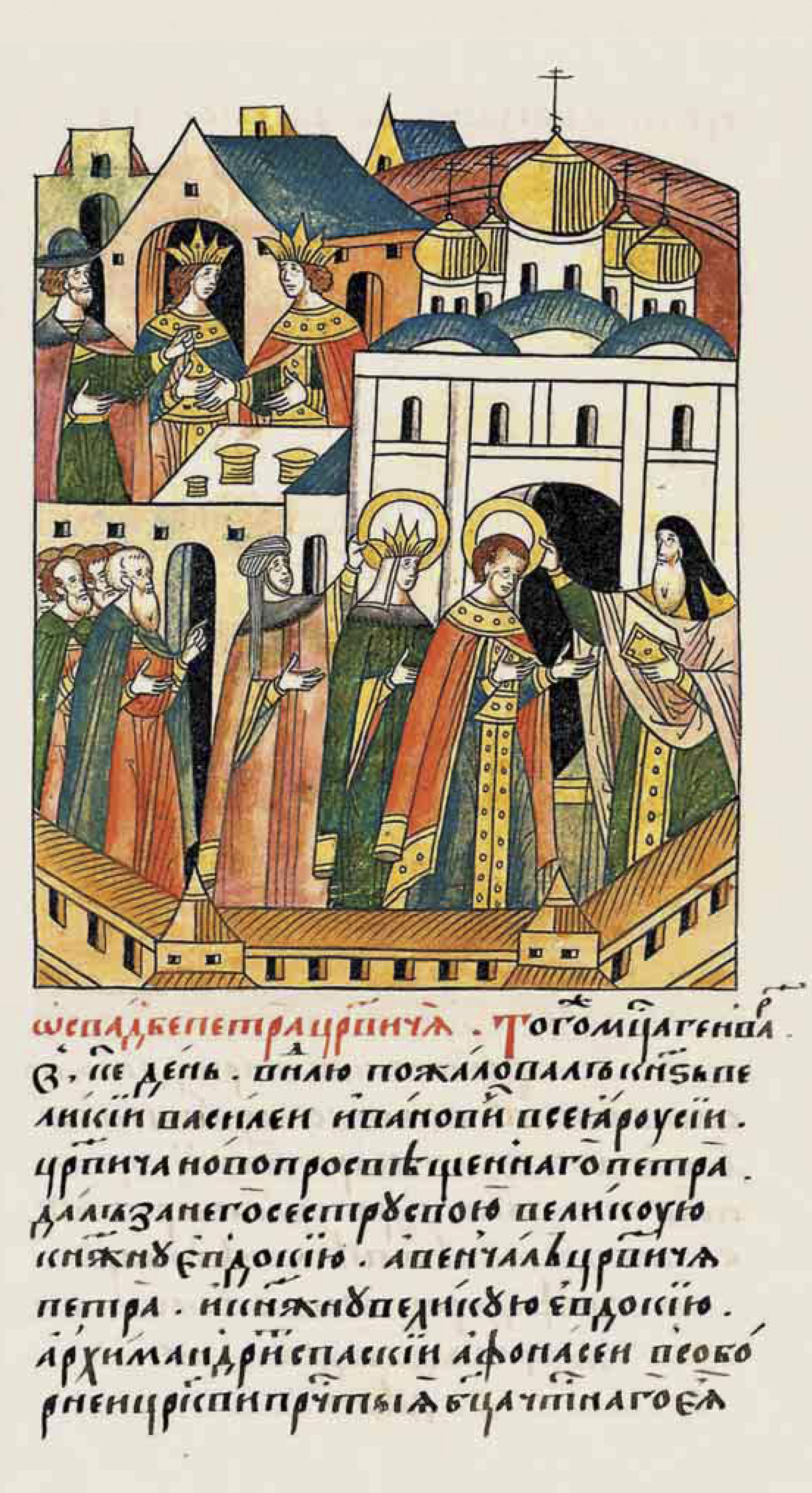 О свадьбе царевича Петра. В том же ме- сяце январе в 25 день в воскресенье пожало- вал великий князь Ва- силий Иванович всея Руси новокрещенного царевича Петра, отдал за него свою сестру великую княжну Евдокию; а венчал ца- ревича Петра и вели- кую княжну Евдокию архимандрит Спасский Афанасий в соборной церкви Пречистой Бо- городицы Честного Ее [Успения в славном городе Москве.]